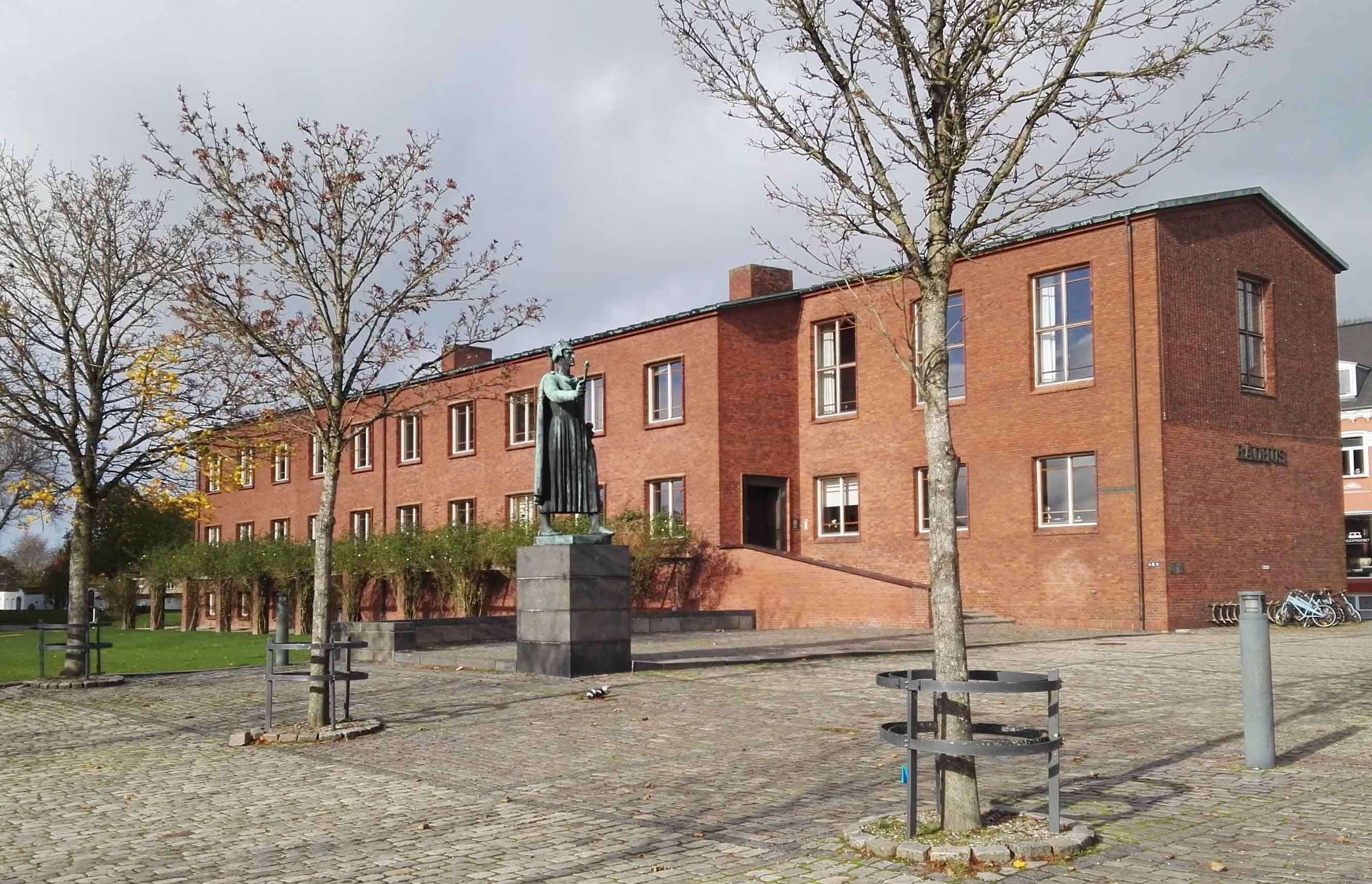 Ringsted Kommunes rådhus på Sct. Bendtsgade 2